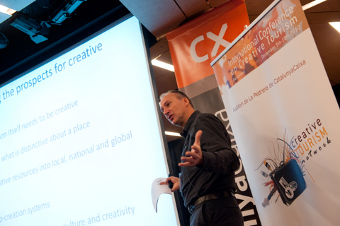 Greg Richards - Conferencia Turismo Creativo